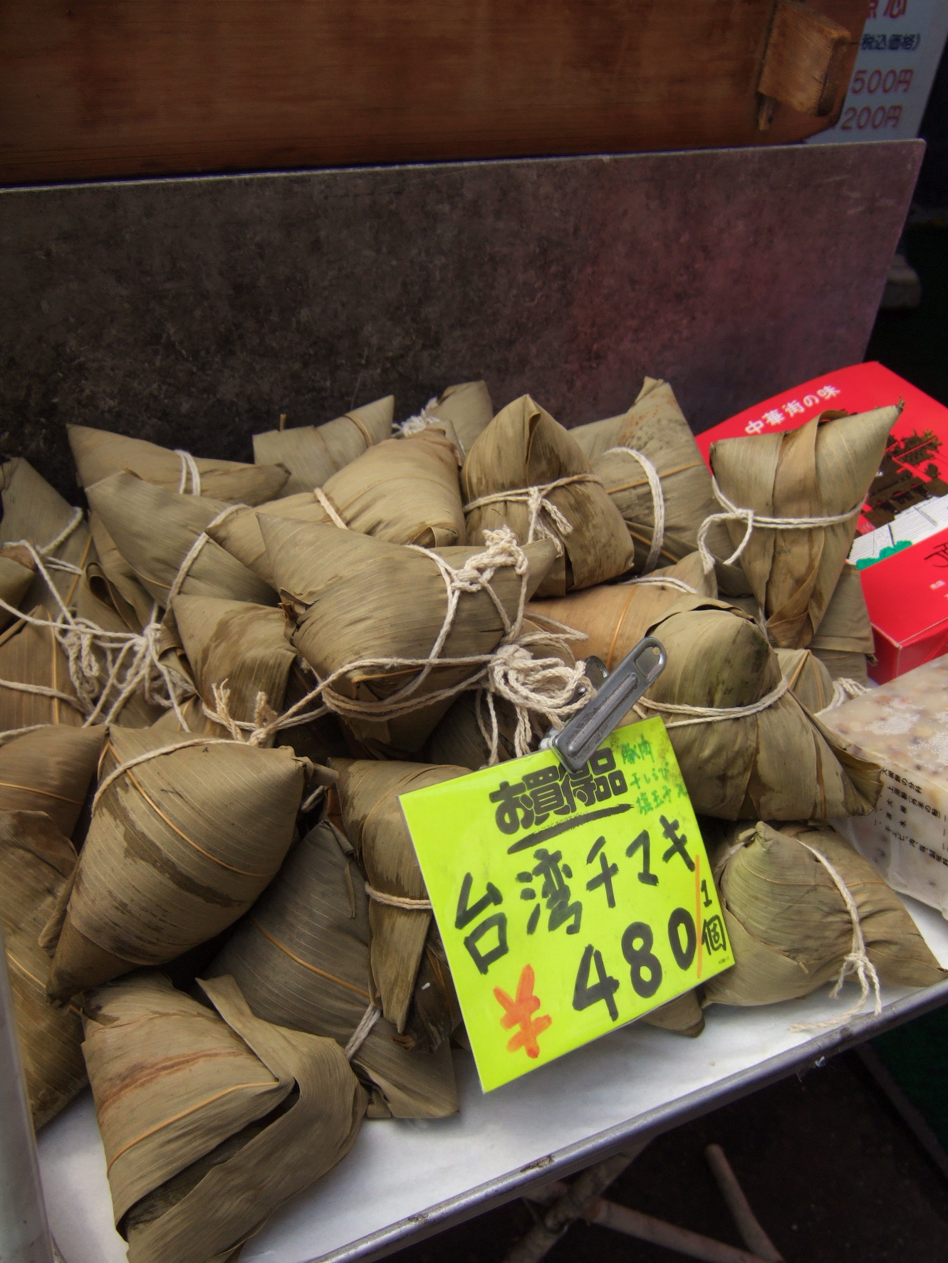 台湾の粽（横浜中華街）